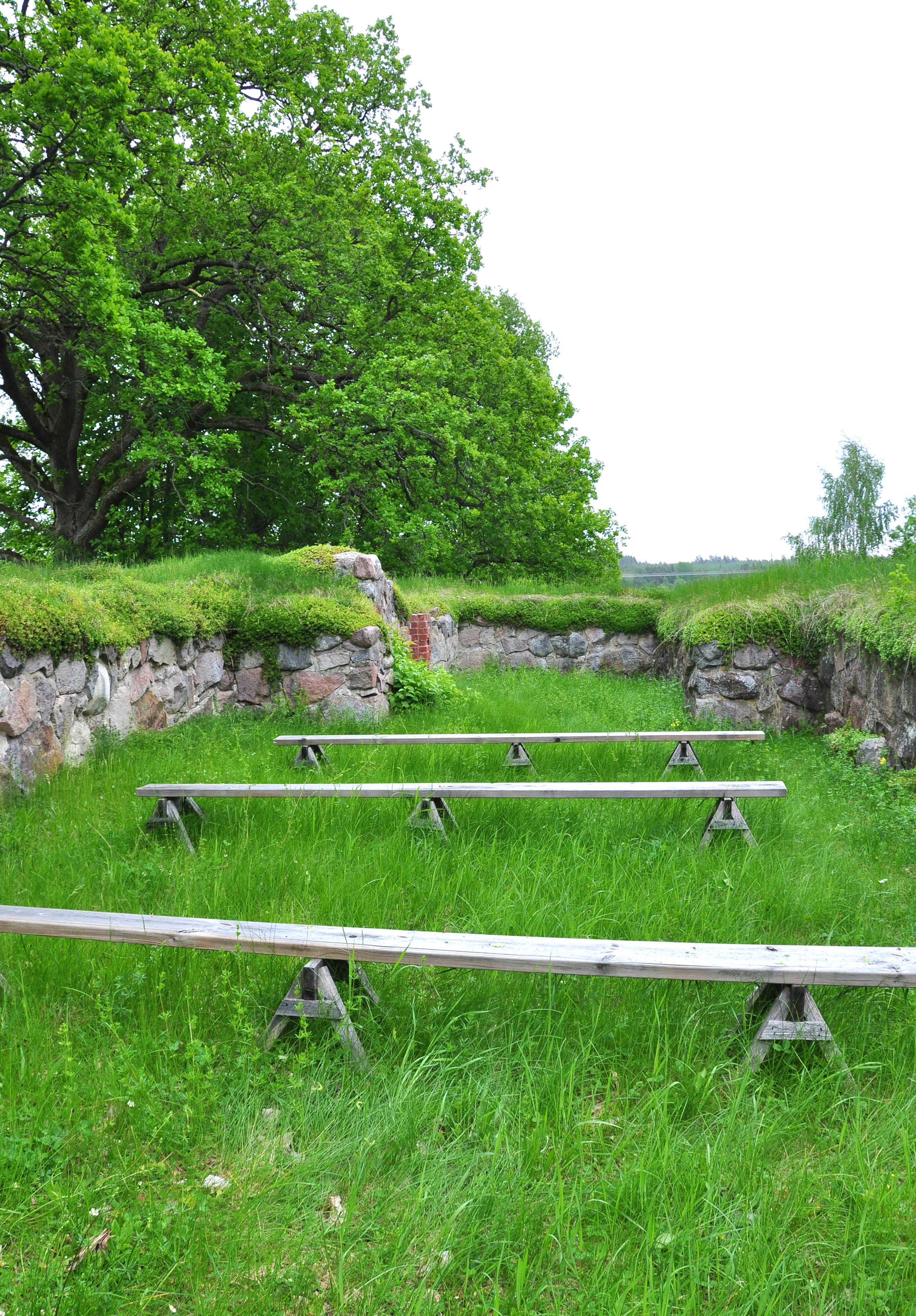 Ärja ödekyrka i Åker (mitt emellan Strängnäs och Mariefred) i Södermanland.